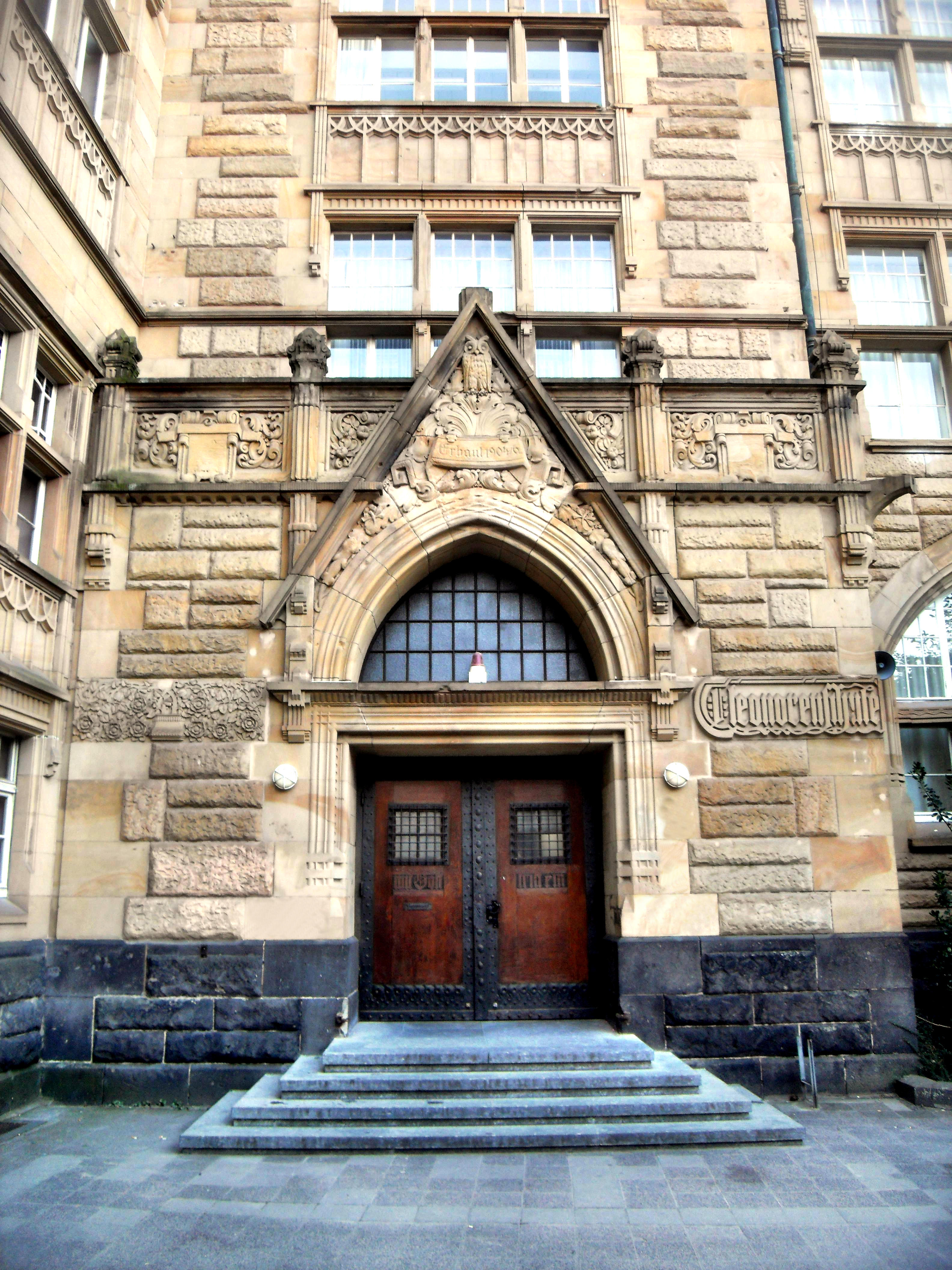 Haupteingang des Eleonoren-Gymnasiums im rheinland-pfälzischen Worms in Deutschland